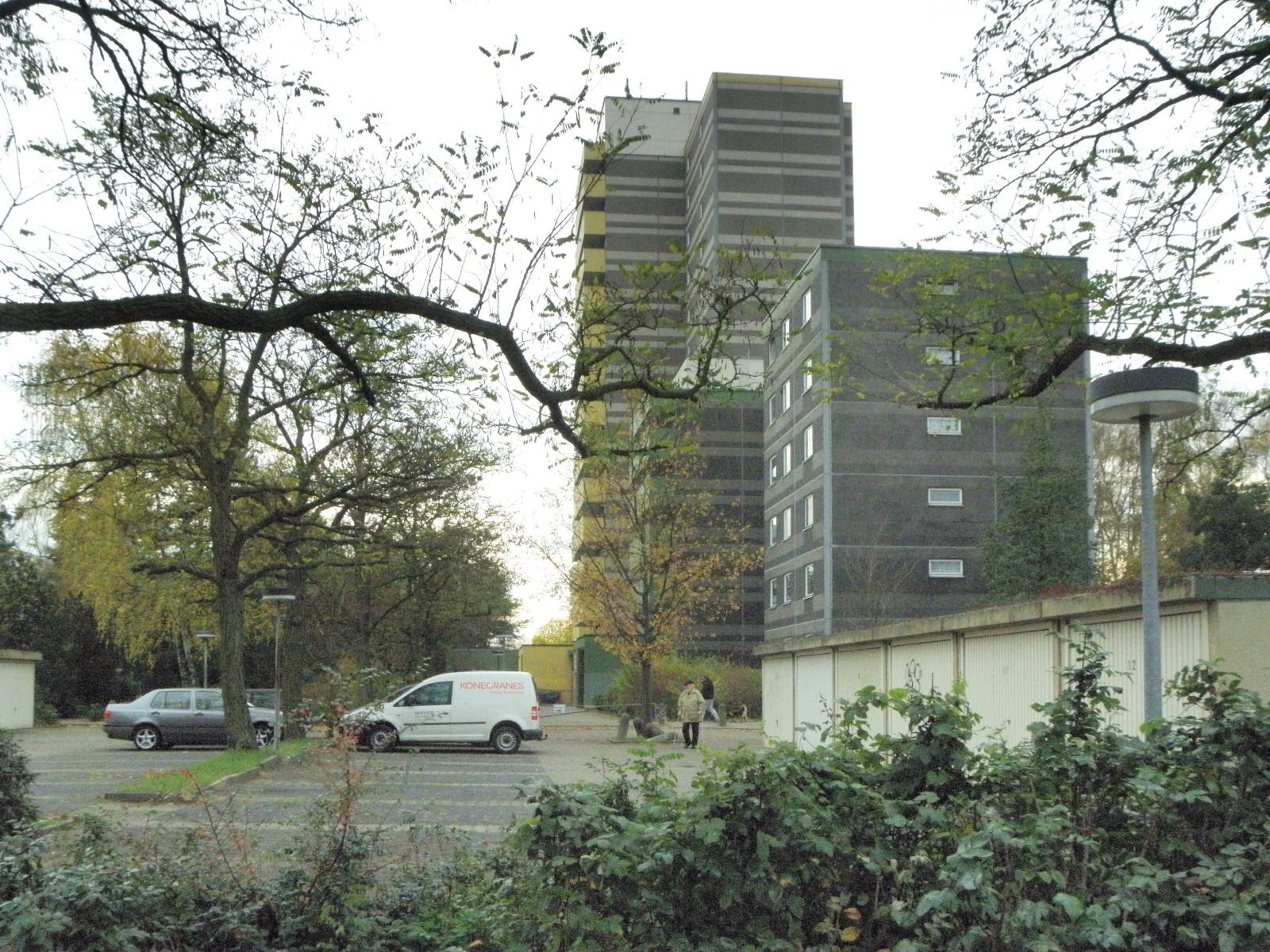 Freudstraße